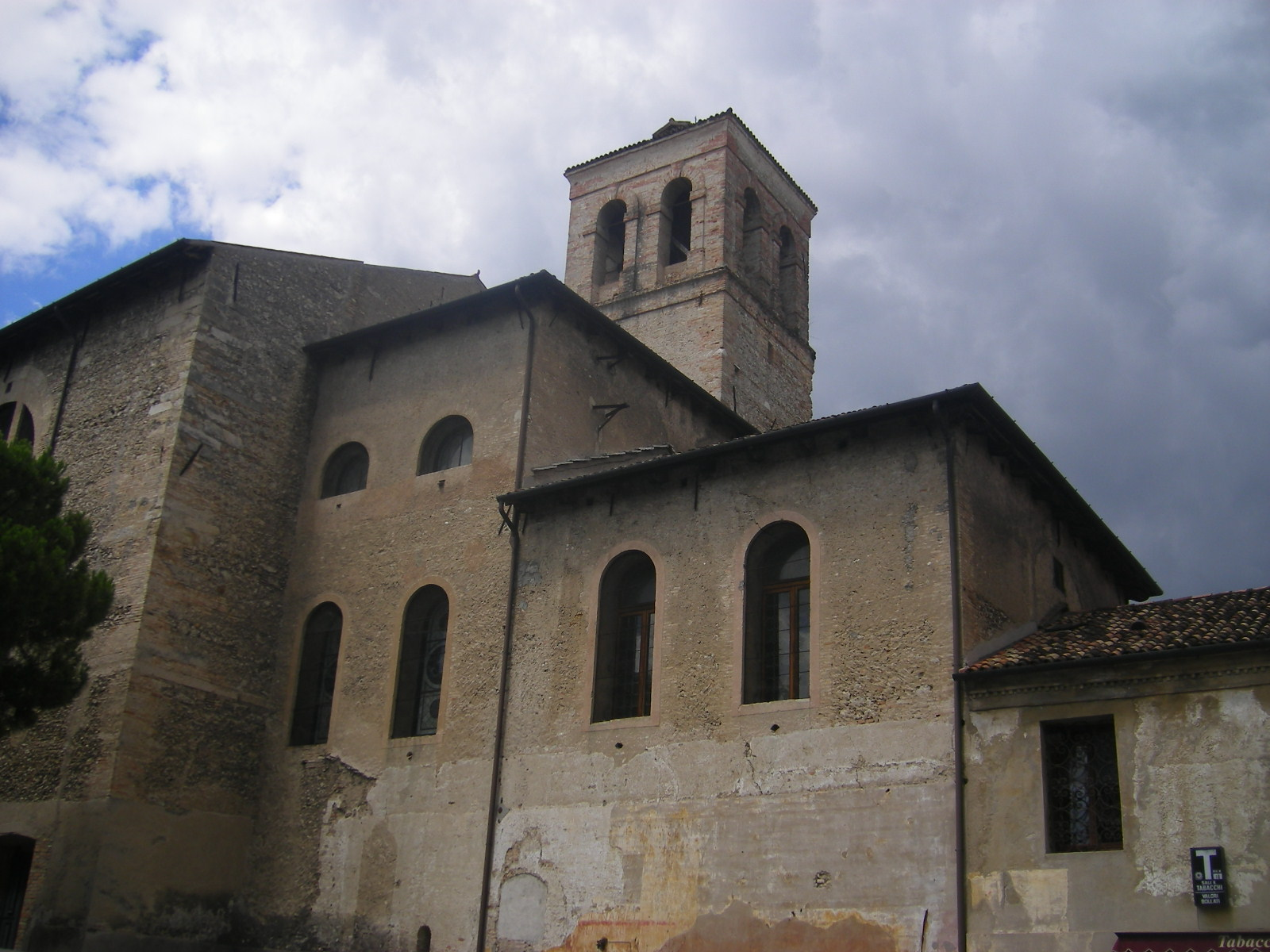 Conegliano